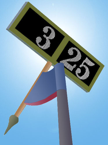 tekening van een digitale zonnewijzer